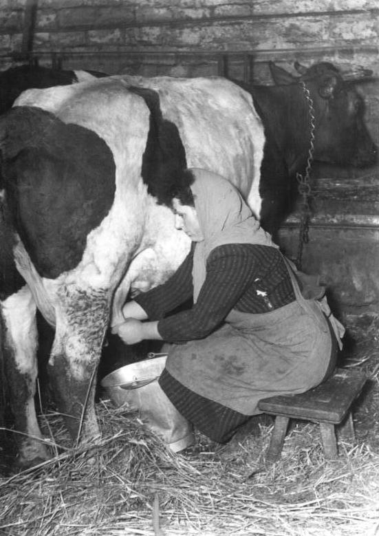 Bäuerin beim Melken Zentralbild Quasch. Hlg.-Ho. 5 Motive 25.3.1954 Selbstverpflichtung Berliner Bauern zum IV. Parteitag der Sozialistischen Einheitspartei Deutschlands.Die Bauern von Altglienicke verpflichteten sich, zu Ehren des IV. Parteitages der SKD im Monat März 10.000 Liter Milch zusätzlich der Berliner Bevölkerung zu liefern und die Aussaat des Sommergetreides bis Ende März zu beenden. Ausserdem verpflichteten sich einzelne Bauern zu zusätzlichen Fleischlieferungen. UBz: Auch die Frauen der Bauern tragen nicht unwesentlich zur Erfüllung der Selbstverpflichtung bei, denn gerade die Arbeit im Kuhstall ist ihre Aufgabe. -Die Bäuerin Marx beim Melken.